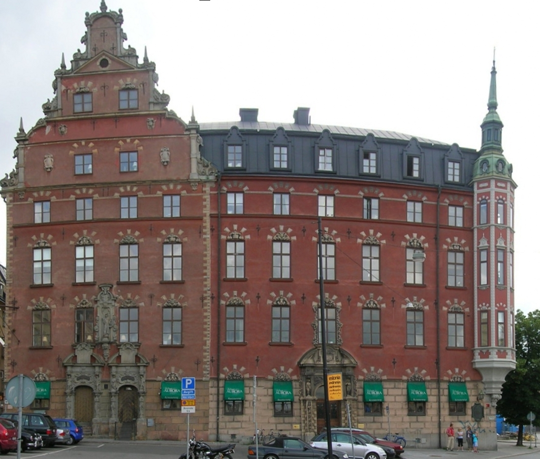 Petersenska huset, uppfört 1645-1649, Gamla stan, Stockholm, Sweden.